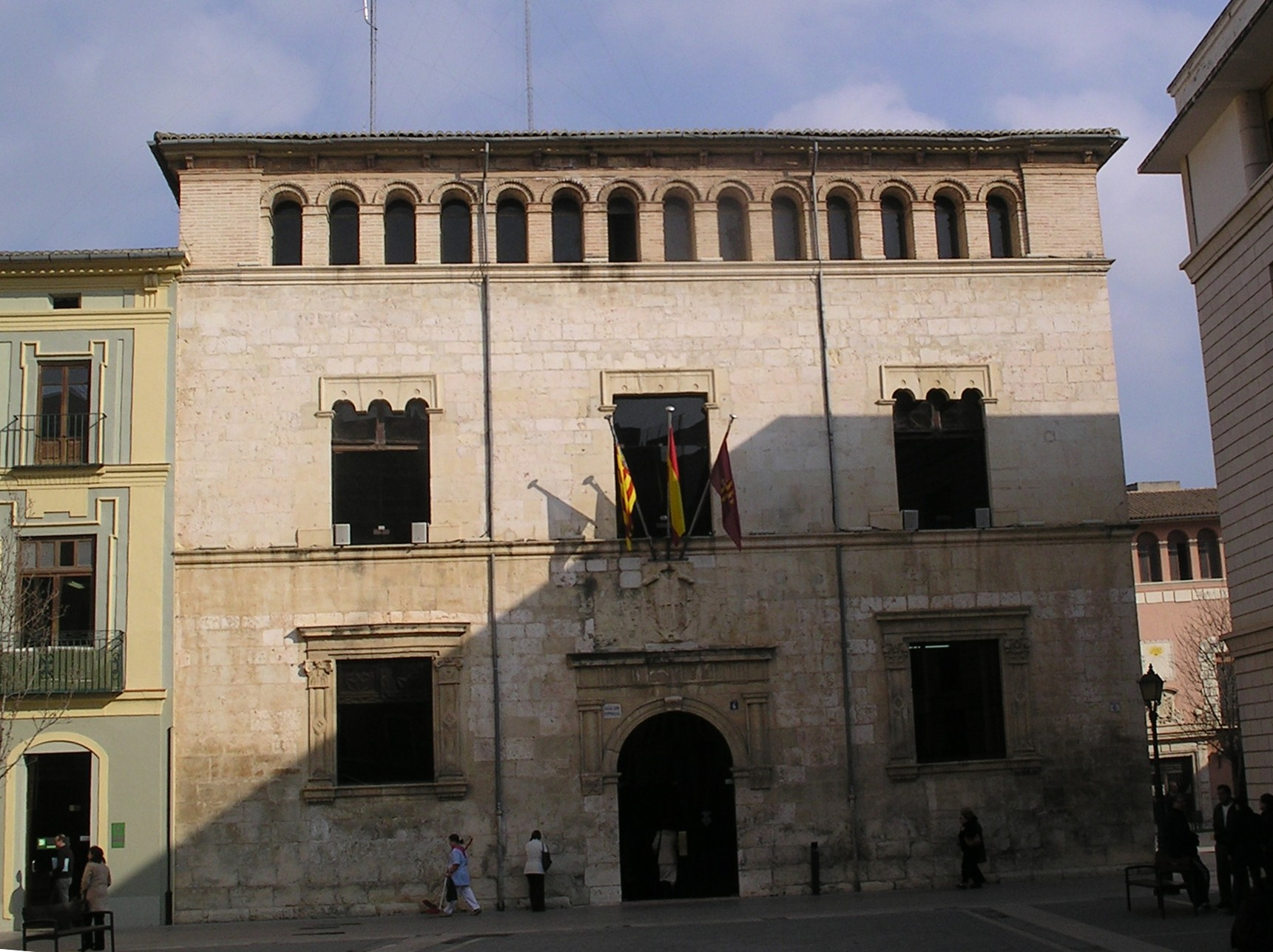 Fachada del Ayuntamiento de Alzira, Valencia, España.